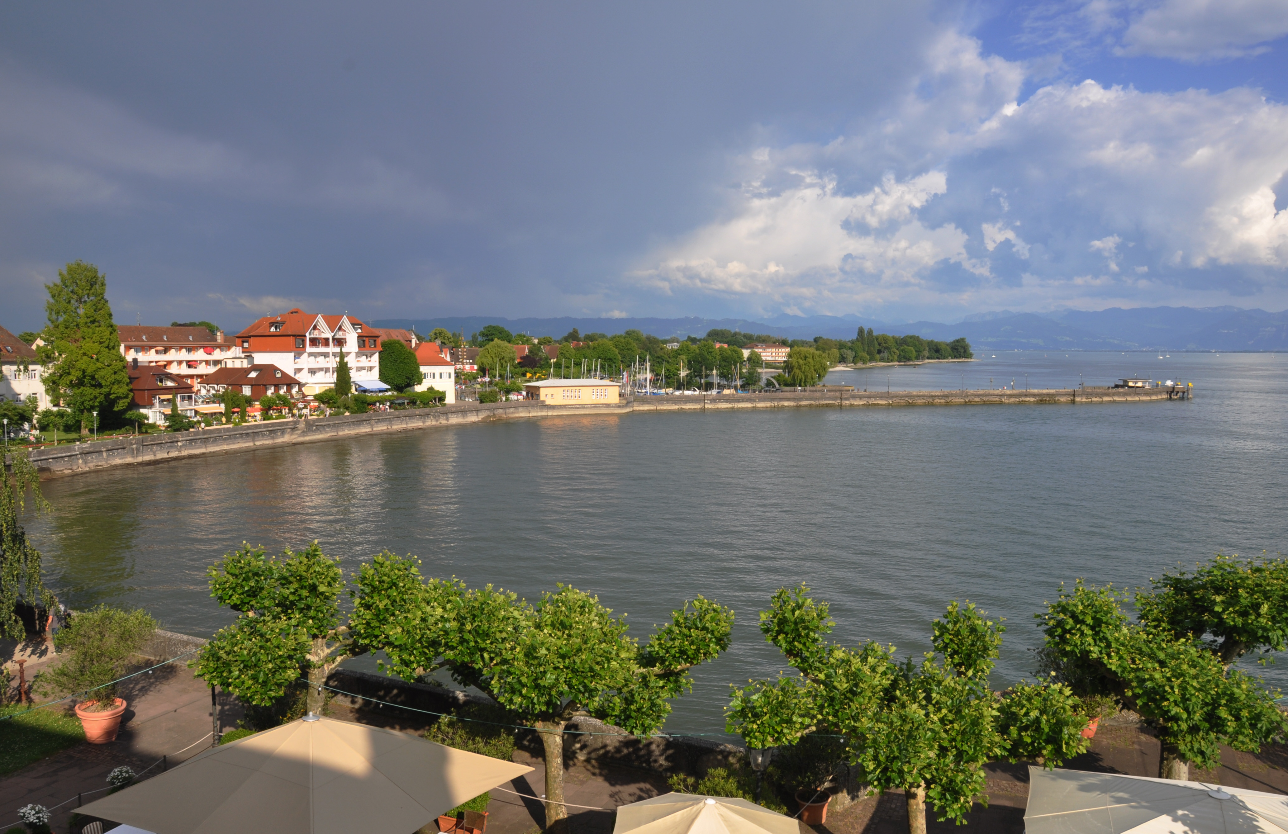 Langenargen, Blick von Schloss Montfort Richtung Osten